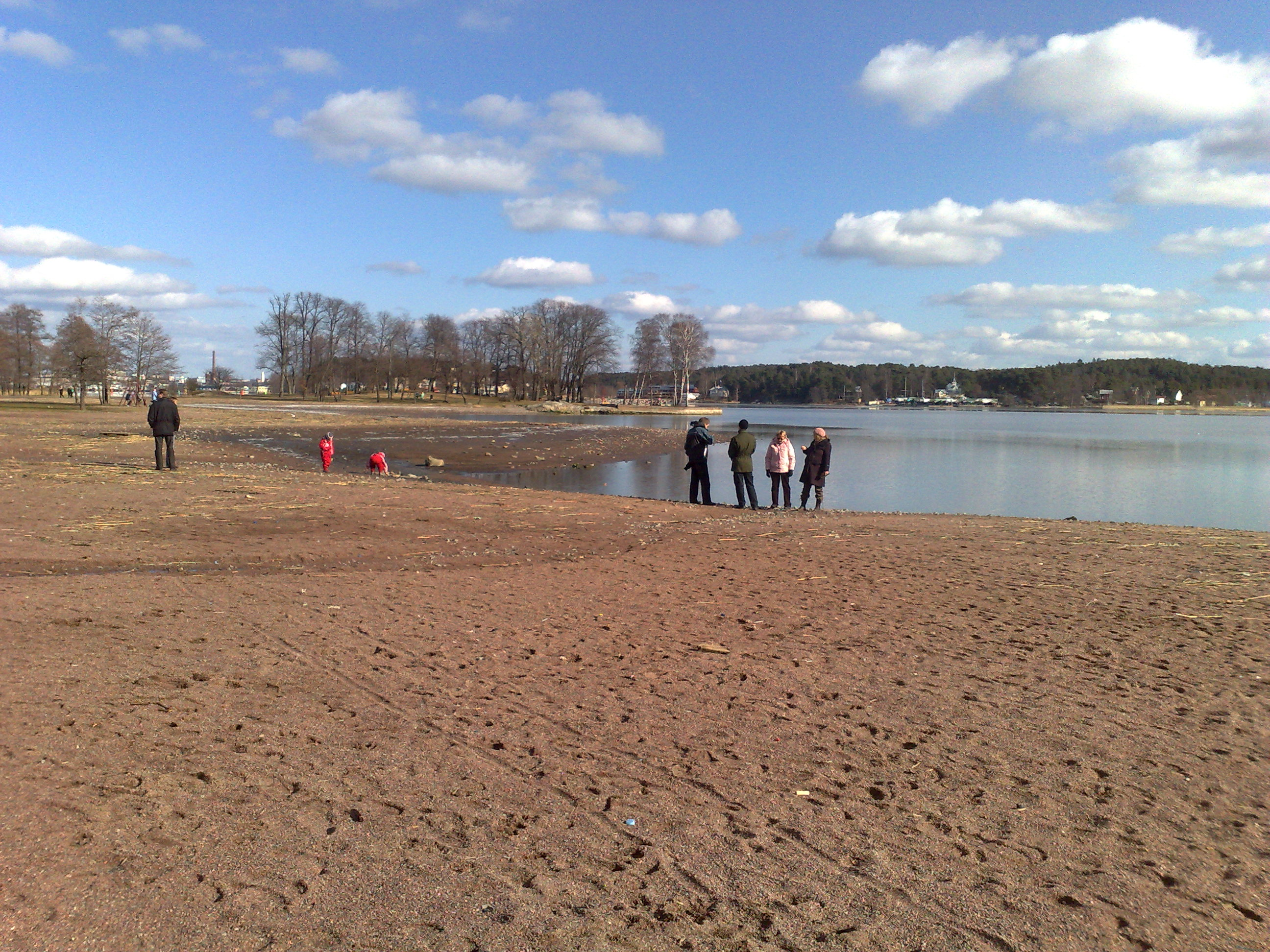 Kansanpuiston uimaranta, Turku. Ruisrockin järjestämispaikka.